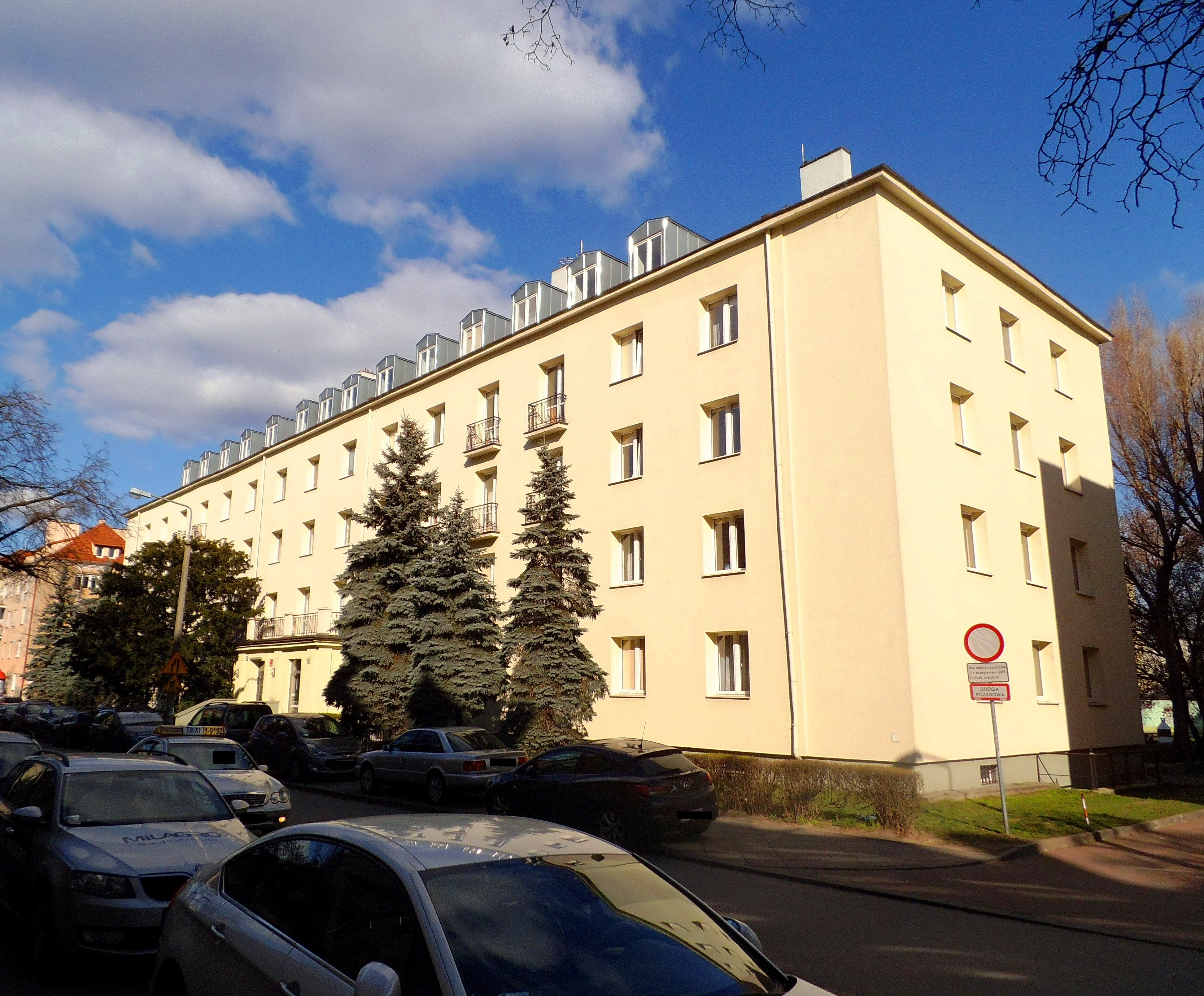 Dom Studencki nr 3 UMK Toruń